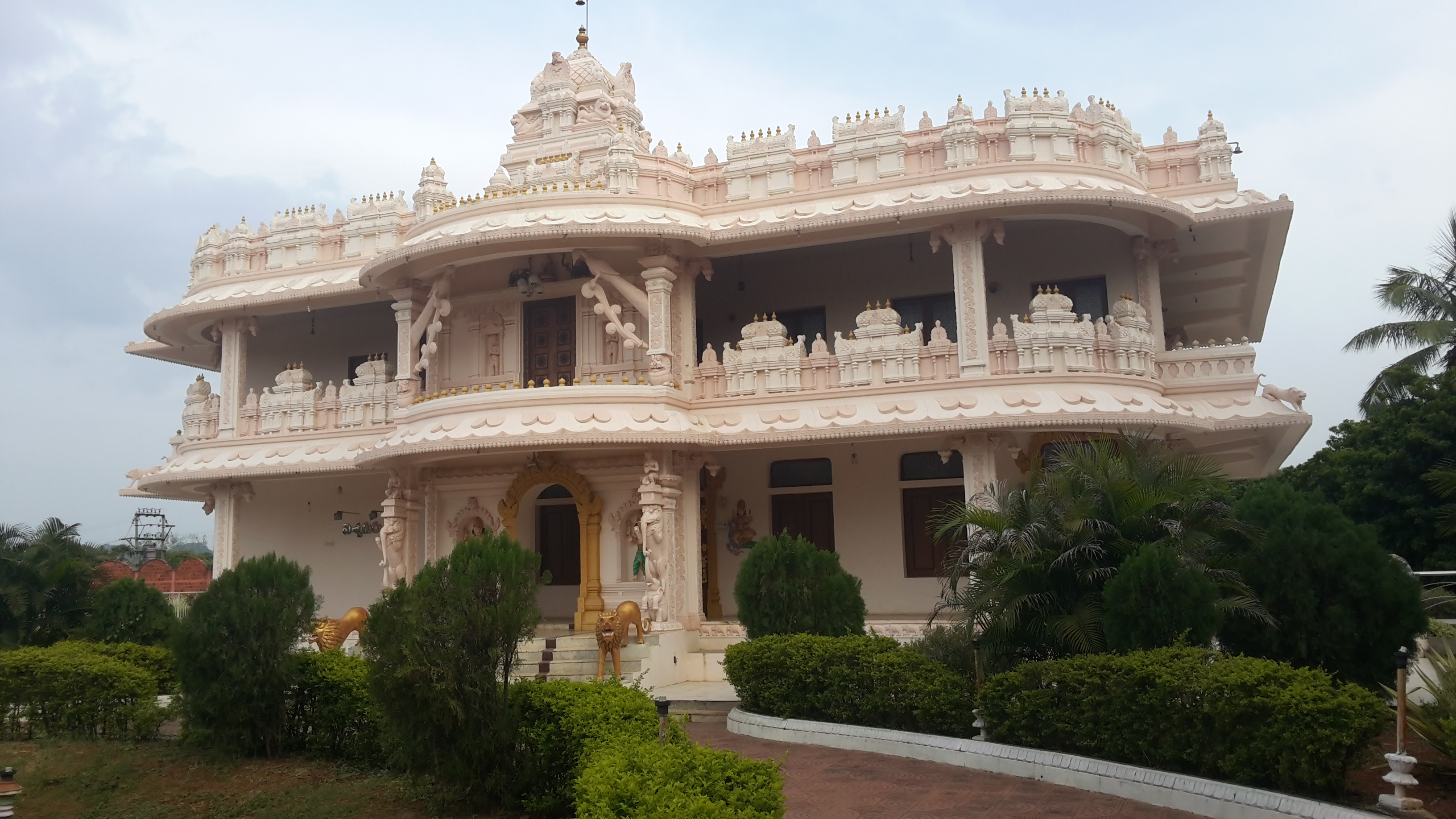 Viswanagar in Guntur district